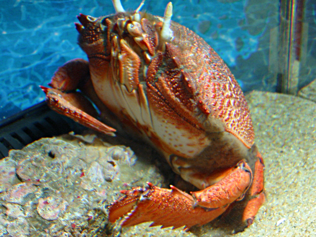 Ranina ranina, Sasebo Seikai Pearl Sea Resort, Nagasaki, Japan